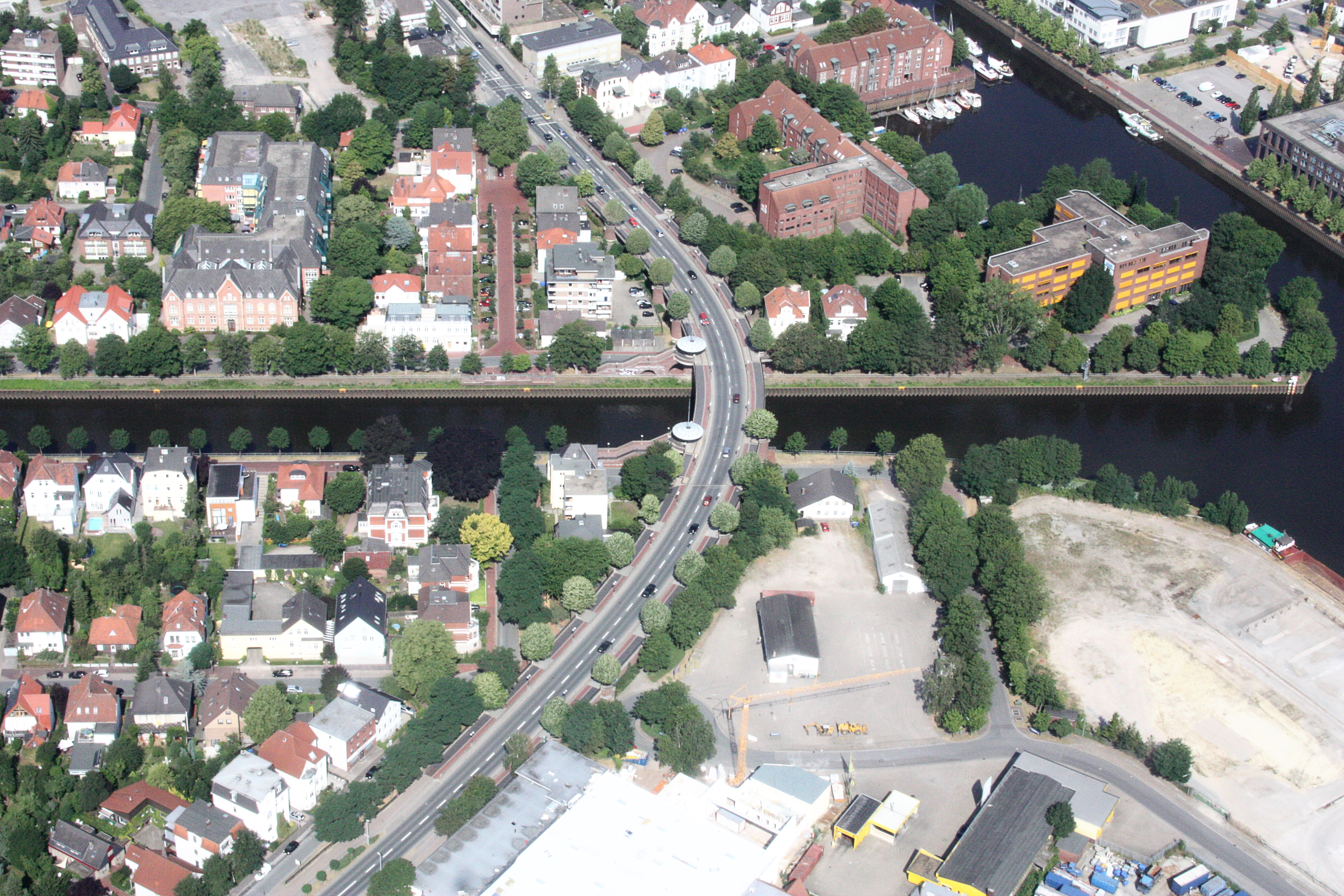 Luftaufnahmen Oldenburg (Oldenburg), mit Weiterflug nach Westen; 1500 Fuß Flughöhe; Juli 2010; Originalfoto bearbeitet: Tonwertkorrektur und Bild geschärft mit Hochpassfilter